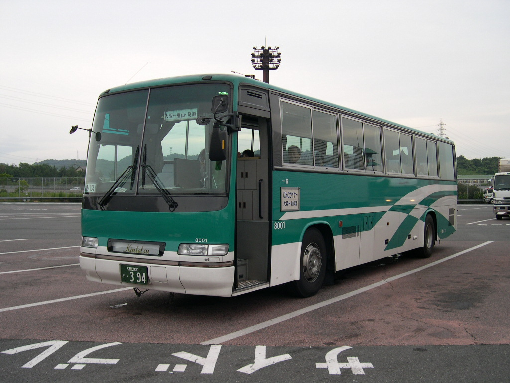 近鉄バス担当